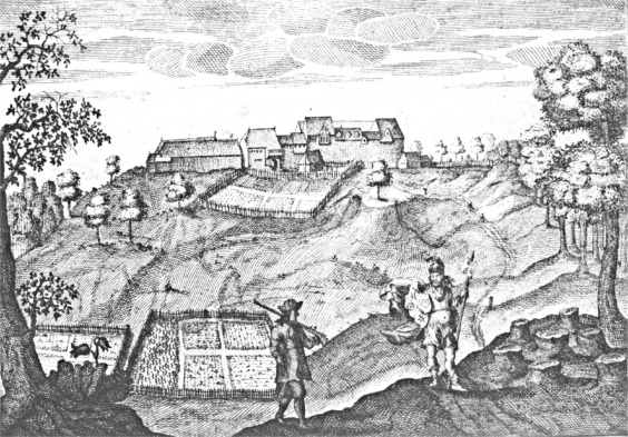 Burg Sternberg, Kupferstich